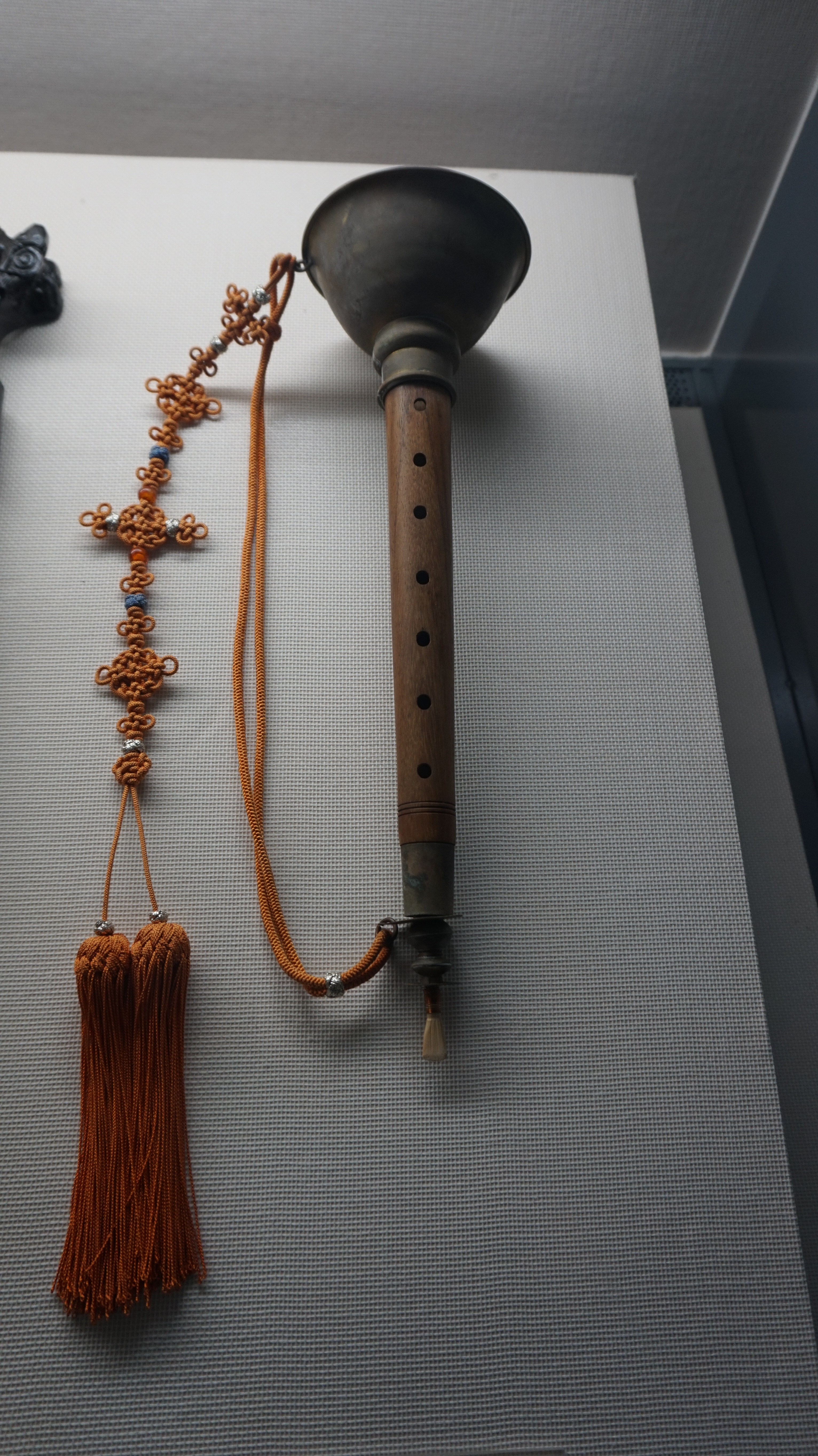 태평소 (1)